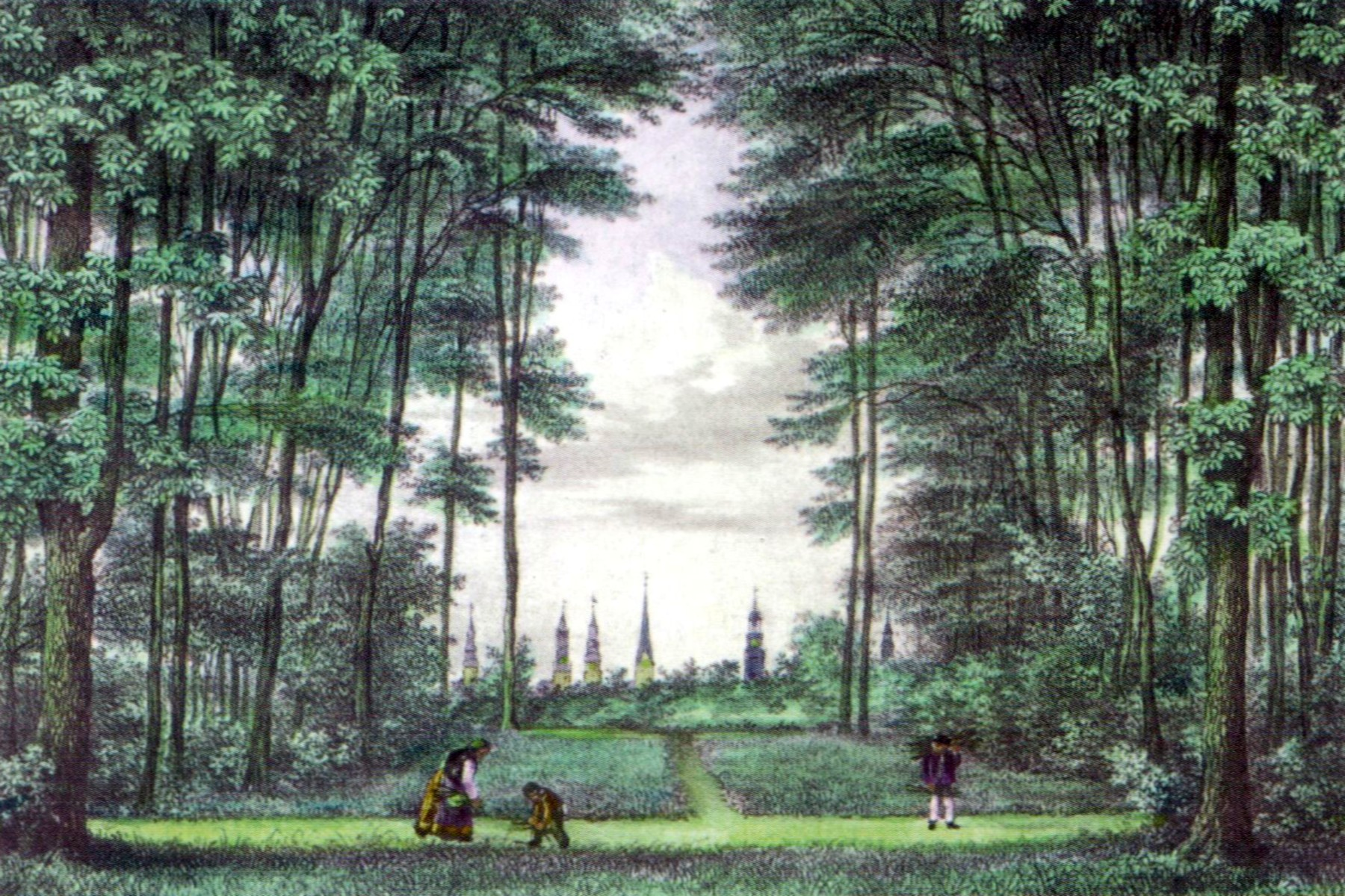 Durchsicht nach Hamburg im Wandsbecker Gehölz, kolorierte Lithografie von J. C. C. Meyn, um 1835